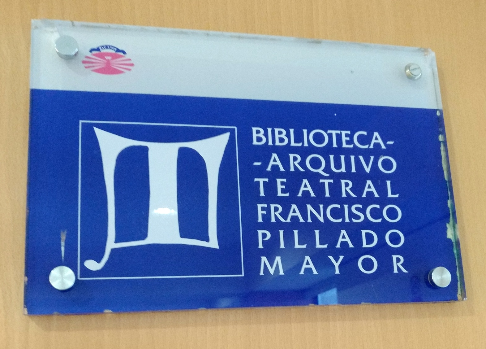 É o placa co logo da Biblioteca-Arquivo Teatral